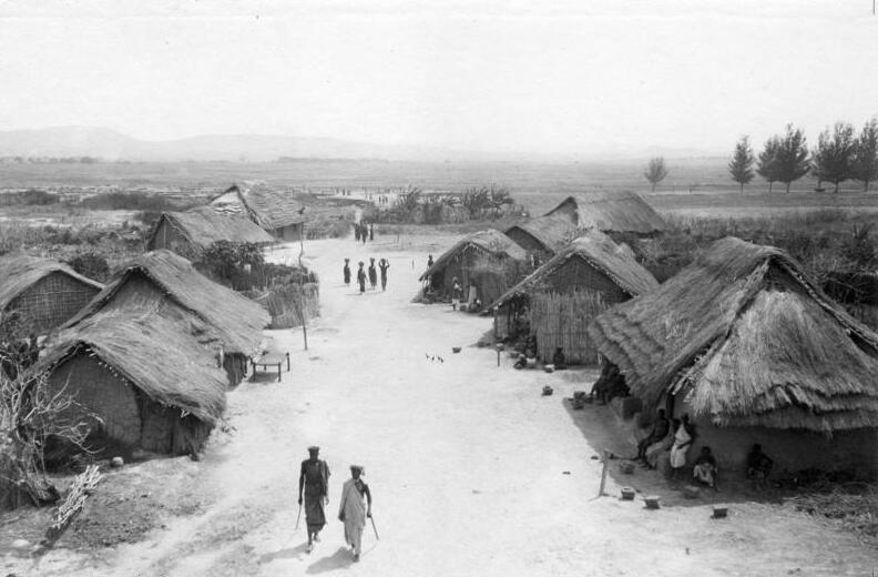 Exzellens Dernburg in Ostafrika Strasse in Tabora